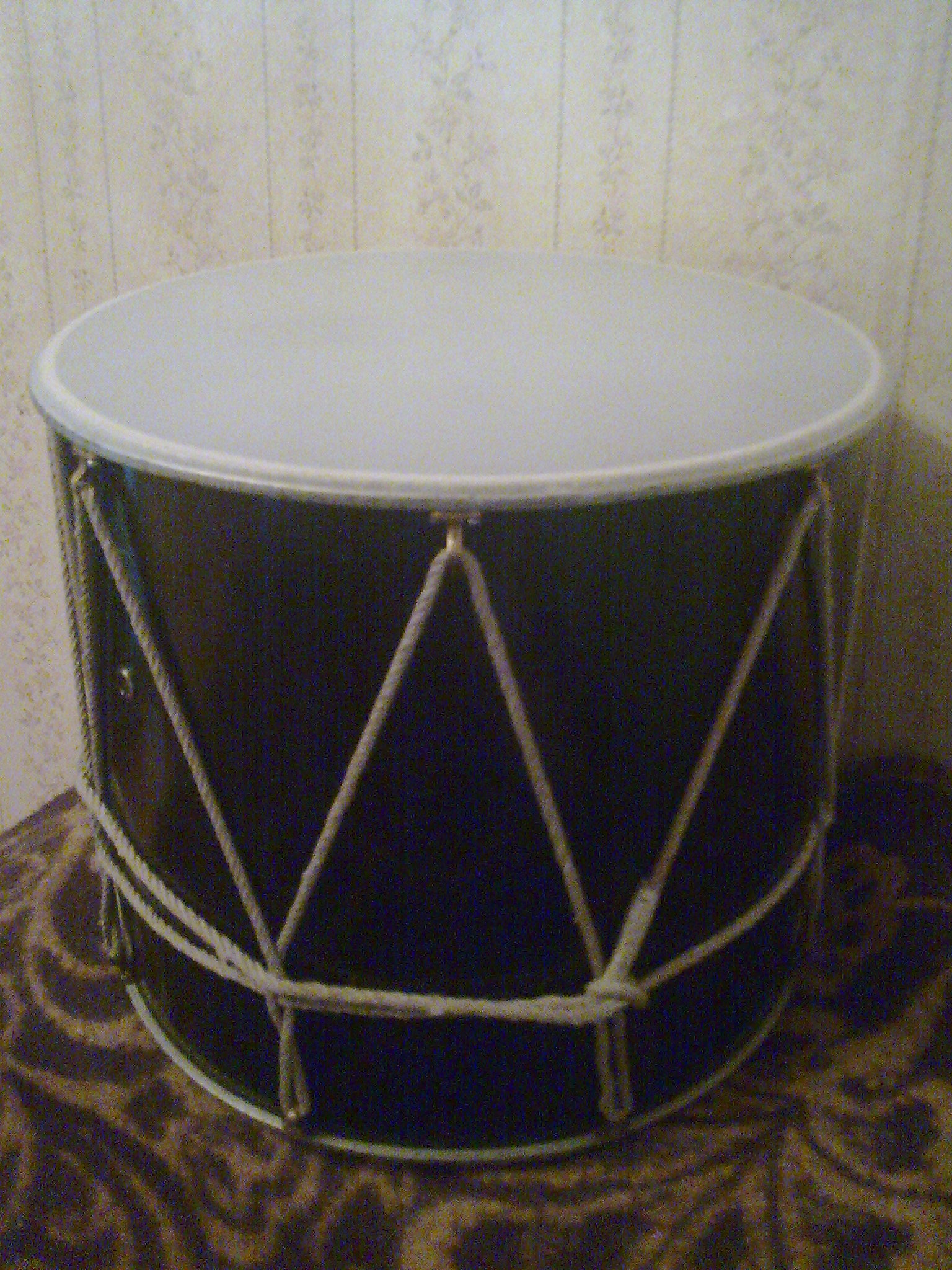 Армянский барабан - дхол